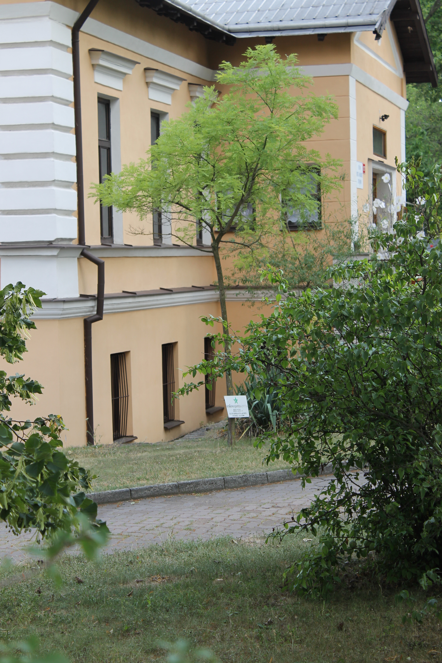 Znojmo, Sokolská 1277/8, středisko volného času.